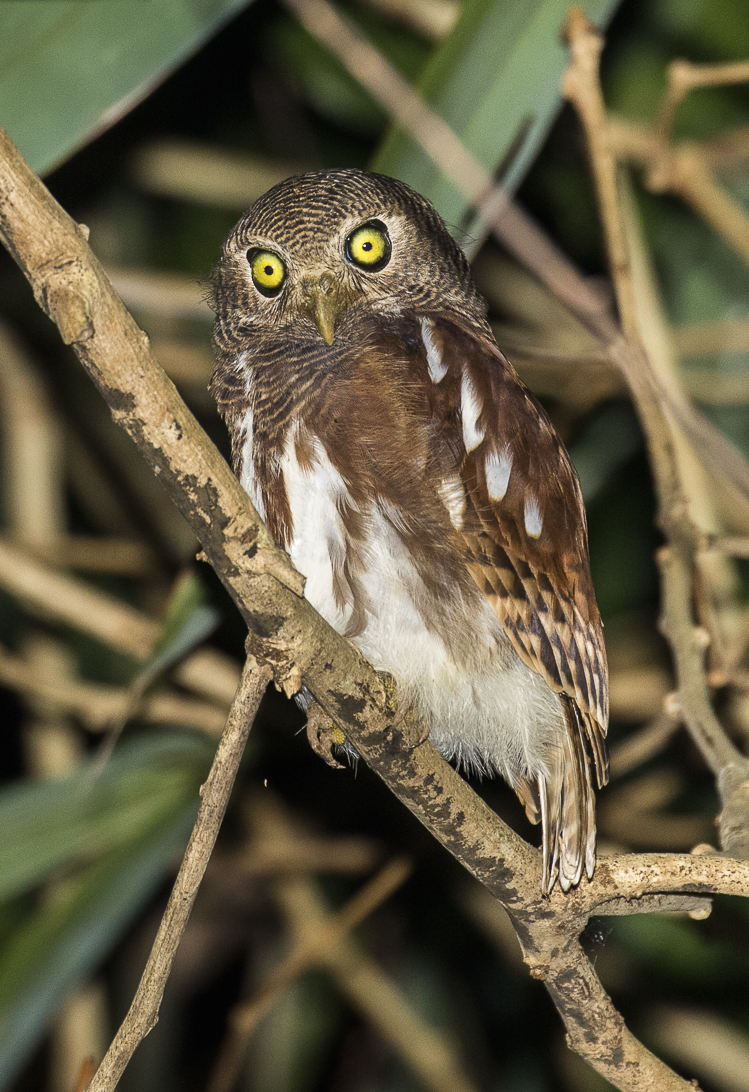 Javan Owlet - Carita - Java_MG_3575